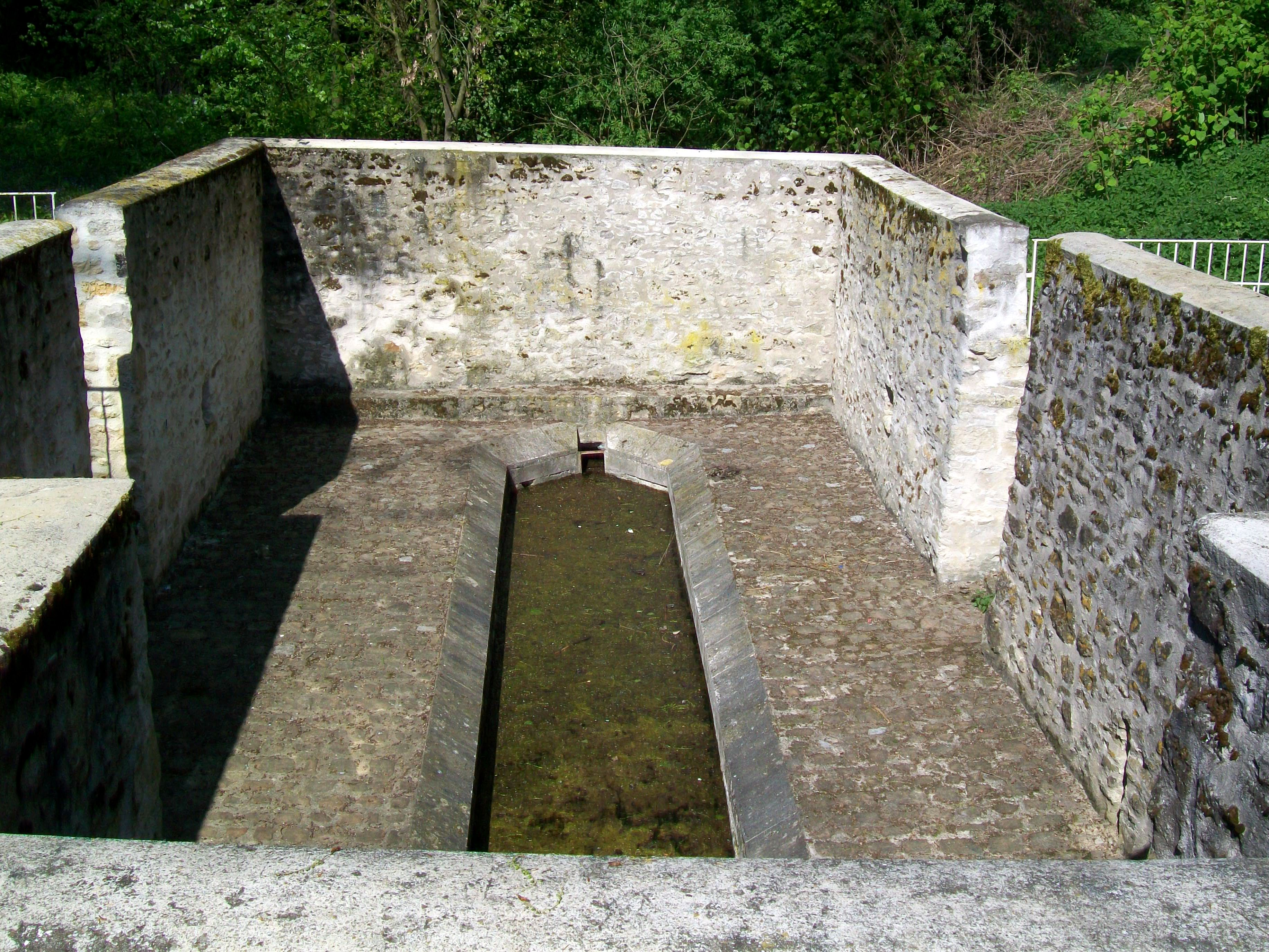 Immédiatement après la source, suit ce bassin, rempli seulement d'eau stagnante par temps sec : en effet, la source n'est plus que temporaire. L'aménagement de la source fait penser à un ancien lavoir couvert.